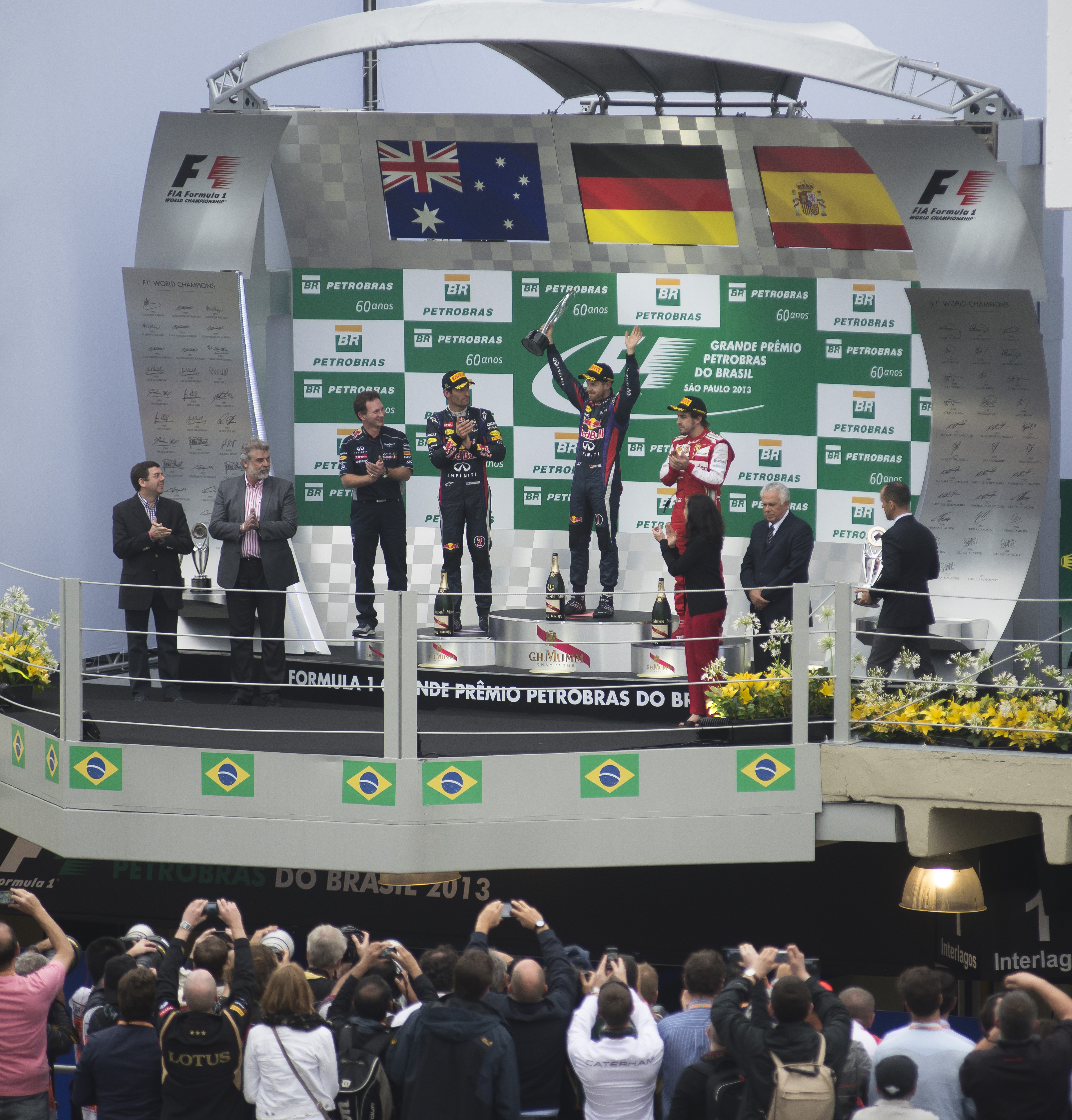 Allianz VIP Lounge. GP Brasil de Fórmula 1. Autodromo de Interlagos. São Paulo, Brasil.